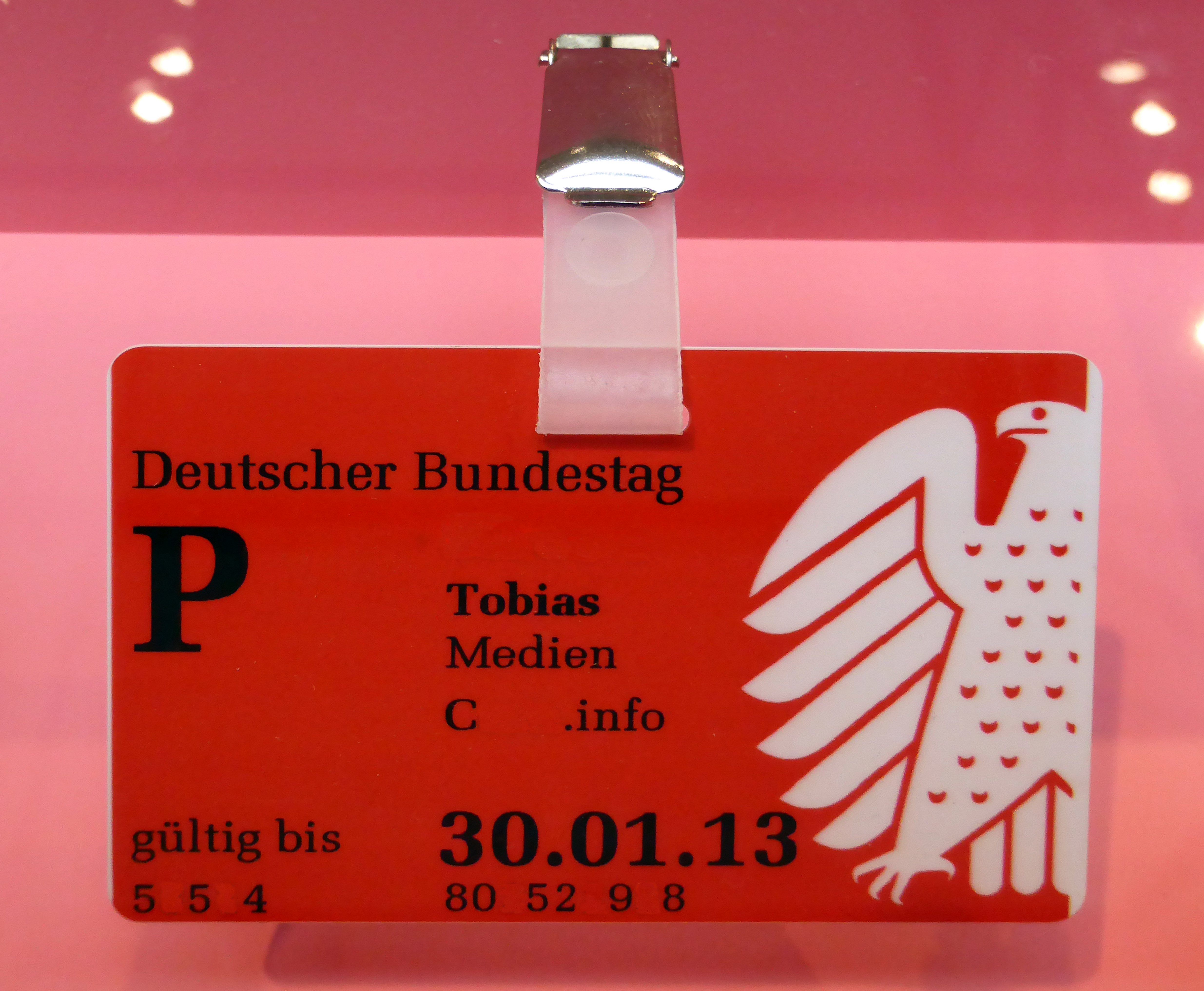 Akkreditierungskarte für den Deutschen Bundestag im Deutschen Technikmuseum in Berlin. Wikipedianische KulTour am 10. Oktober 2015 in der Ausstellung des Museums.